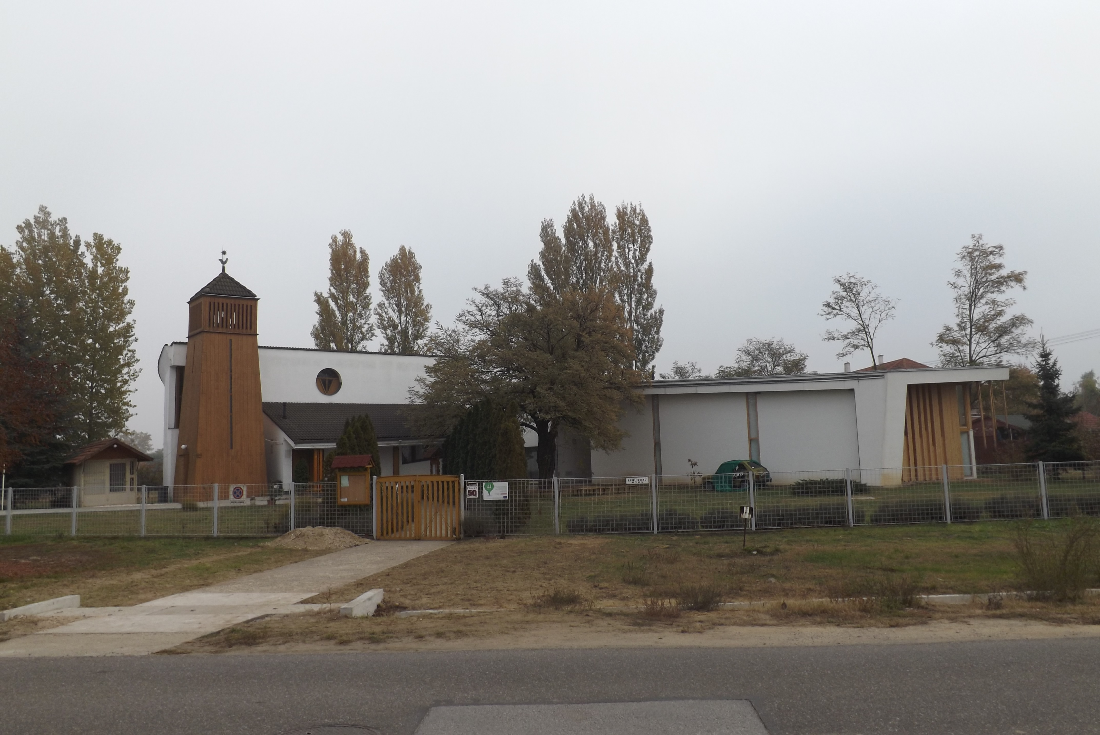 Mátészalka, Északi Lakótelep, református templom épülete